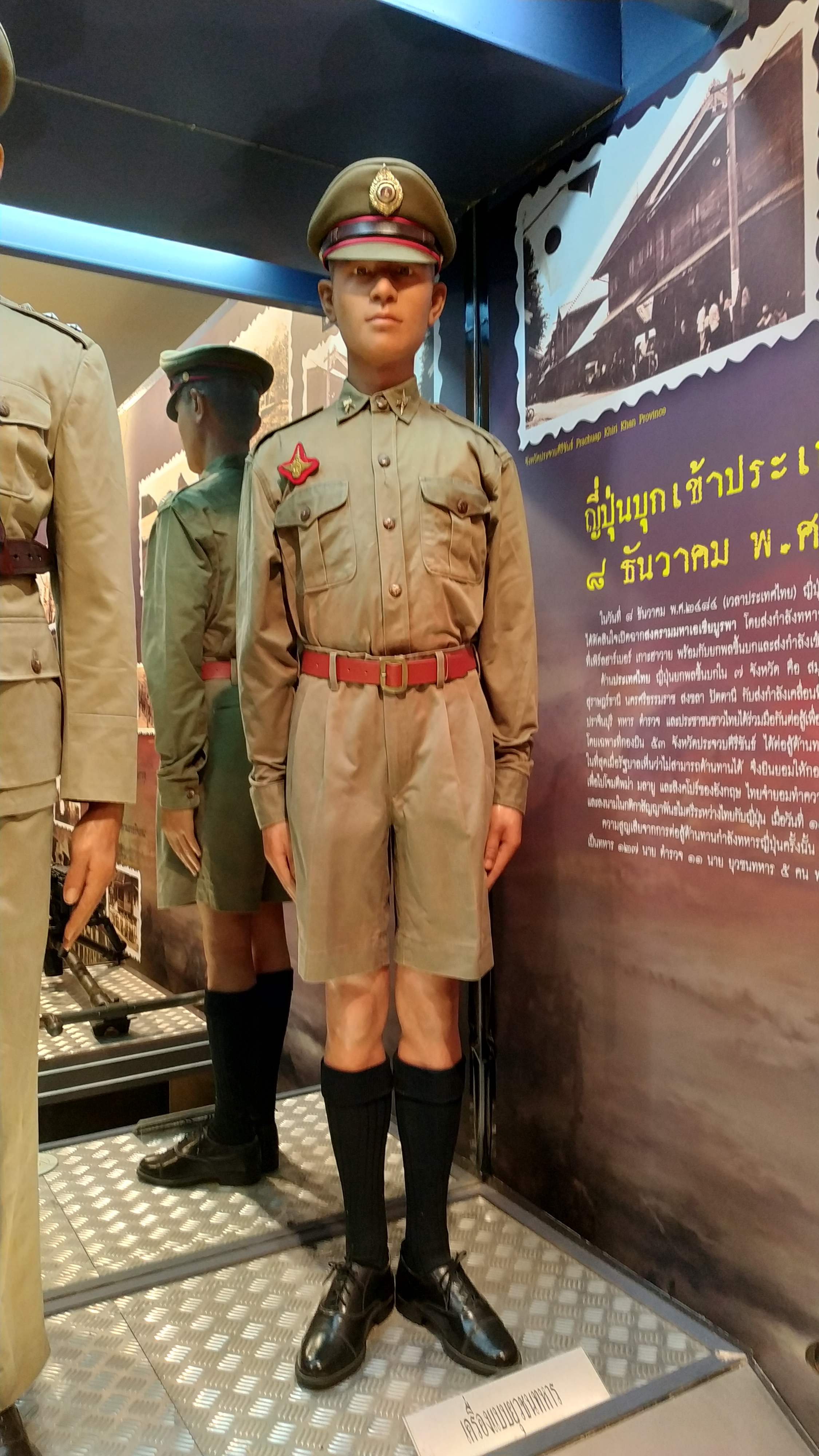 ประติมากรรมลอยตัวรูปเยาวชนไทยในเครื่องแบบยุวชนทหารสมัยสงครามโลกครั้งที่ 2 จัดแสดงในส่วนนิทรรศการประวัติศาสตร์ไทยในสมัยสงครามโลกครั้งที่ 2 ณ อาคารอนุสรณ์สถานแห่งชาติ ตำบลคูคต อำเภอลำลูกกา จังหวัดปทุมธานี